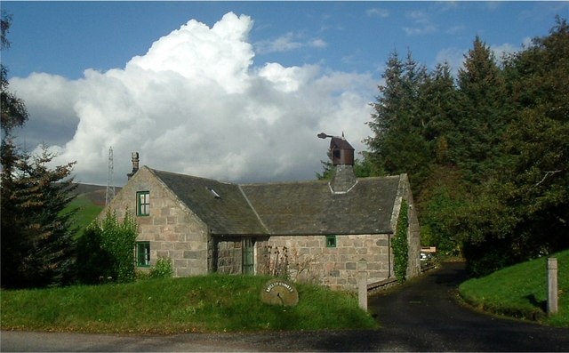 Mill of Ennets, Tornaveen, Aberdeenshire